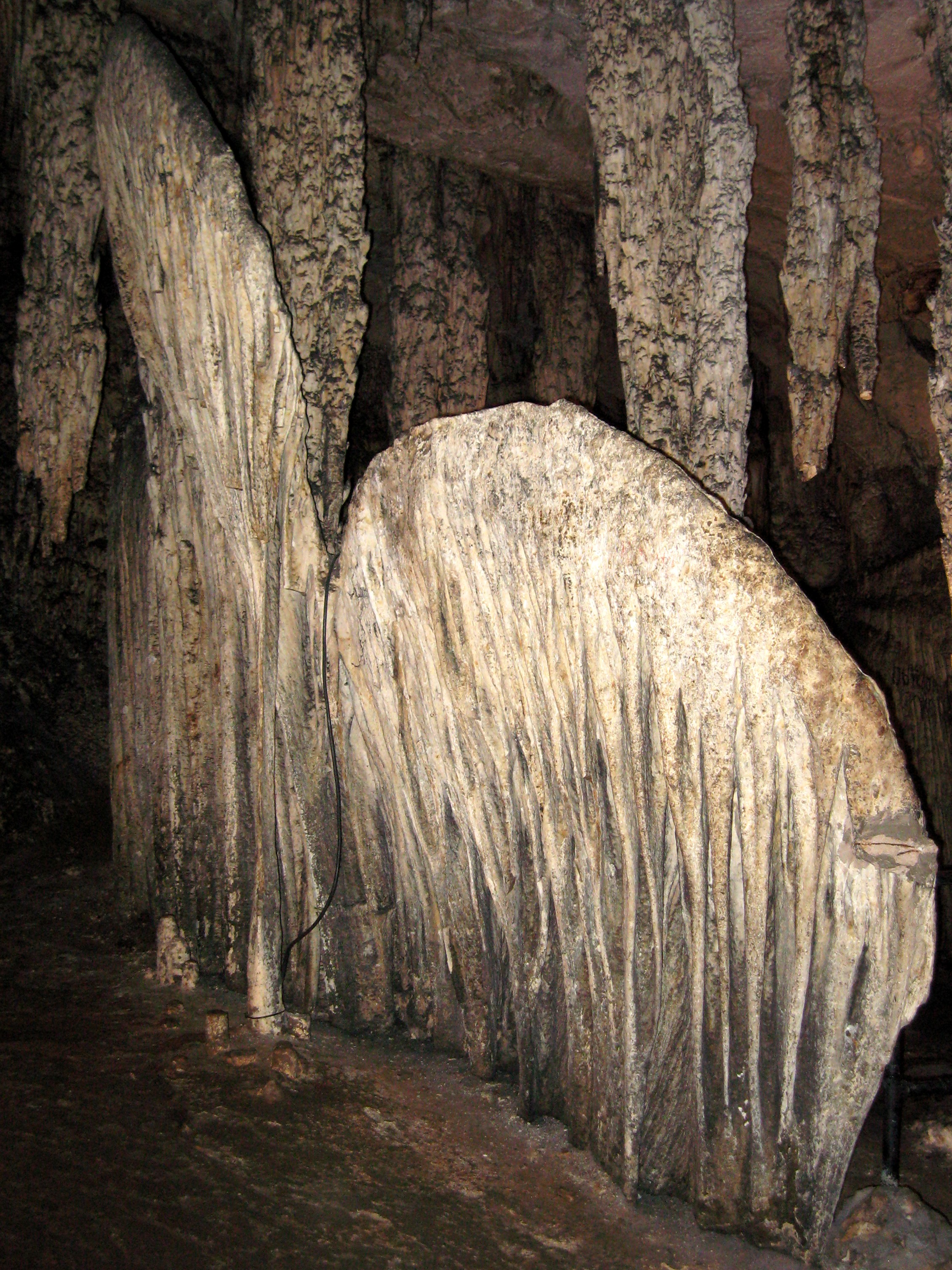 Coves d’Artà, Gemeinde Capdepera, Mallorca, Spanien